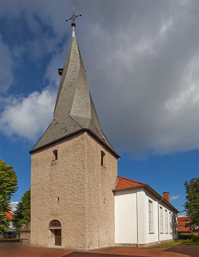 Evangelische Kirche in Alverdissen (Barntrup), Kreis Lippe This is the photograph of an architectural monument. It is part of the list of cultural monuments of Barntrup, no. 4